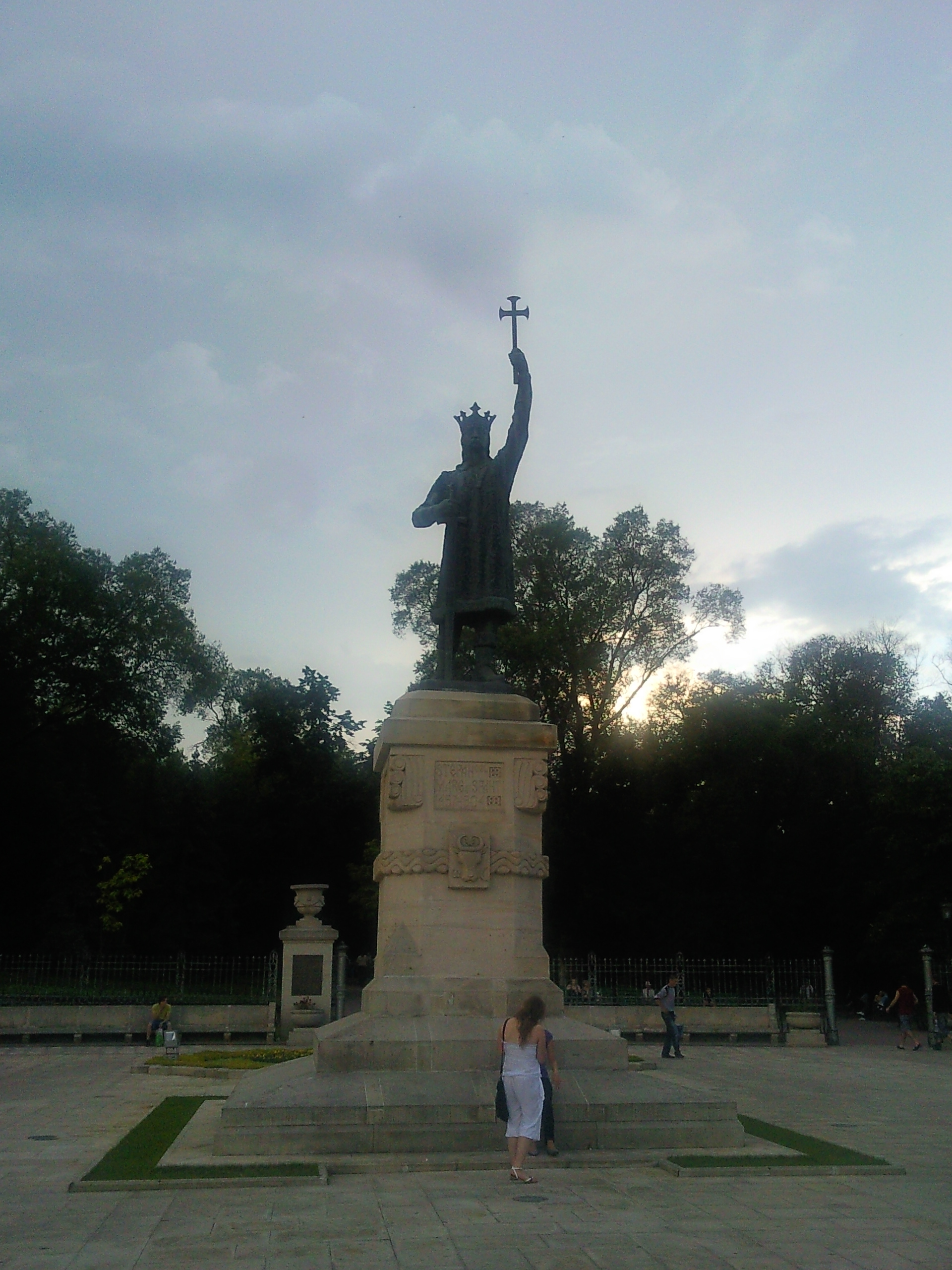 Памятник Стефану III Великому